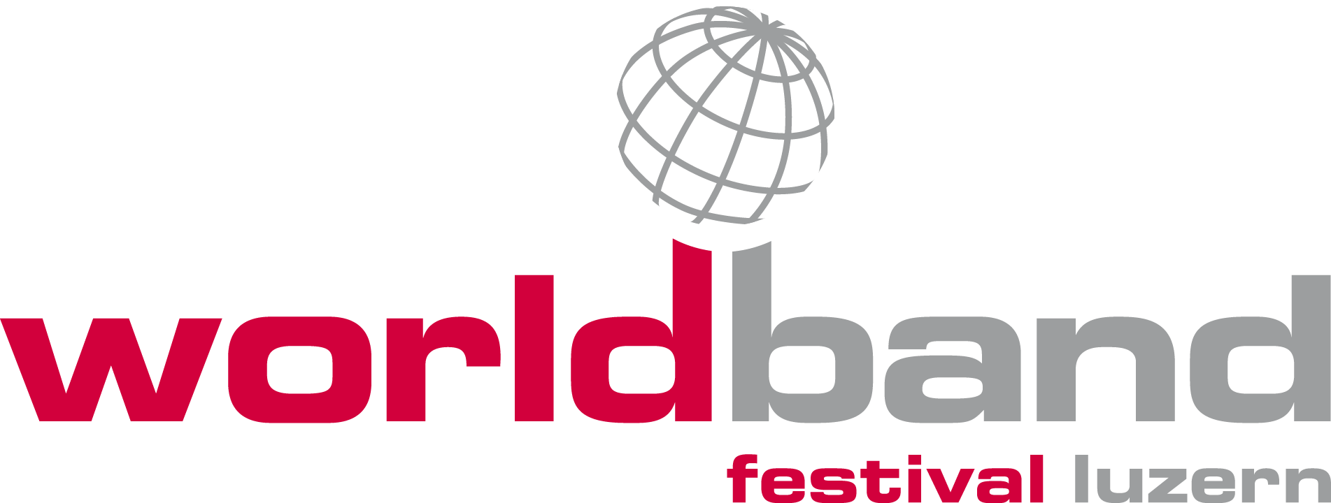 Das Logo des World Band Festival Luzern wurde erstmals im Jahr 2009 publiziert.